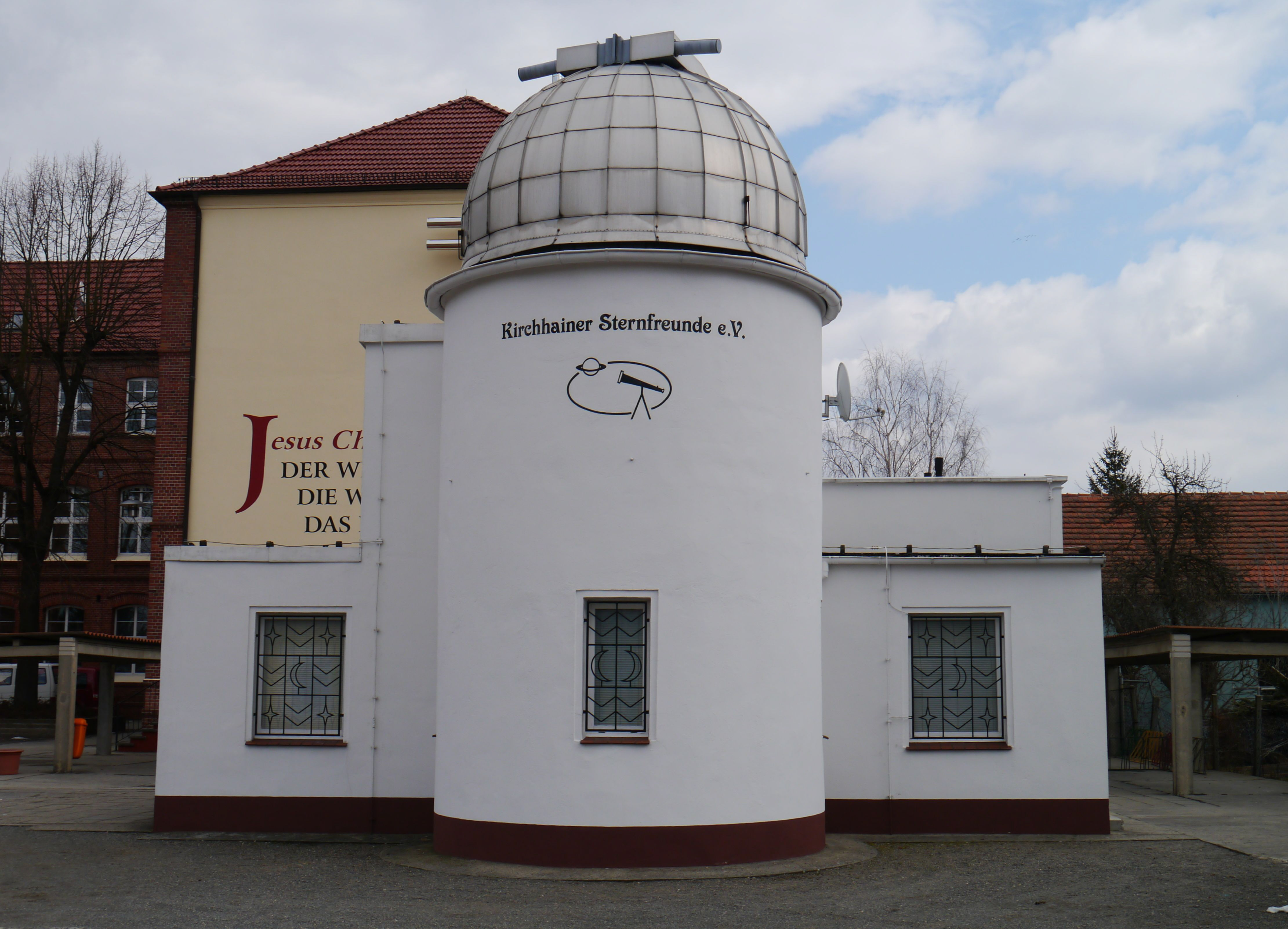 Volkssternwarte Doberlug-Kirchhain auf dem Gelände des Kirchhainer Gymnasiums, Straße der Jugend